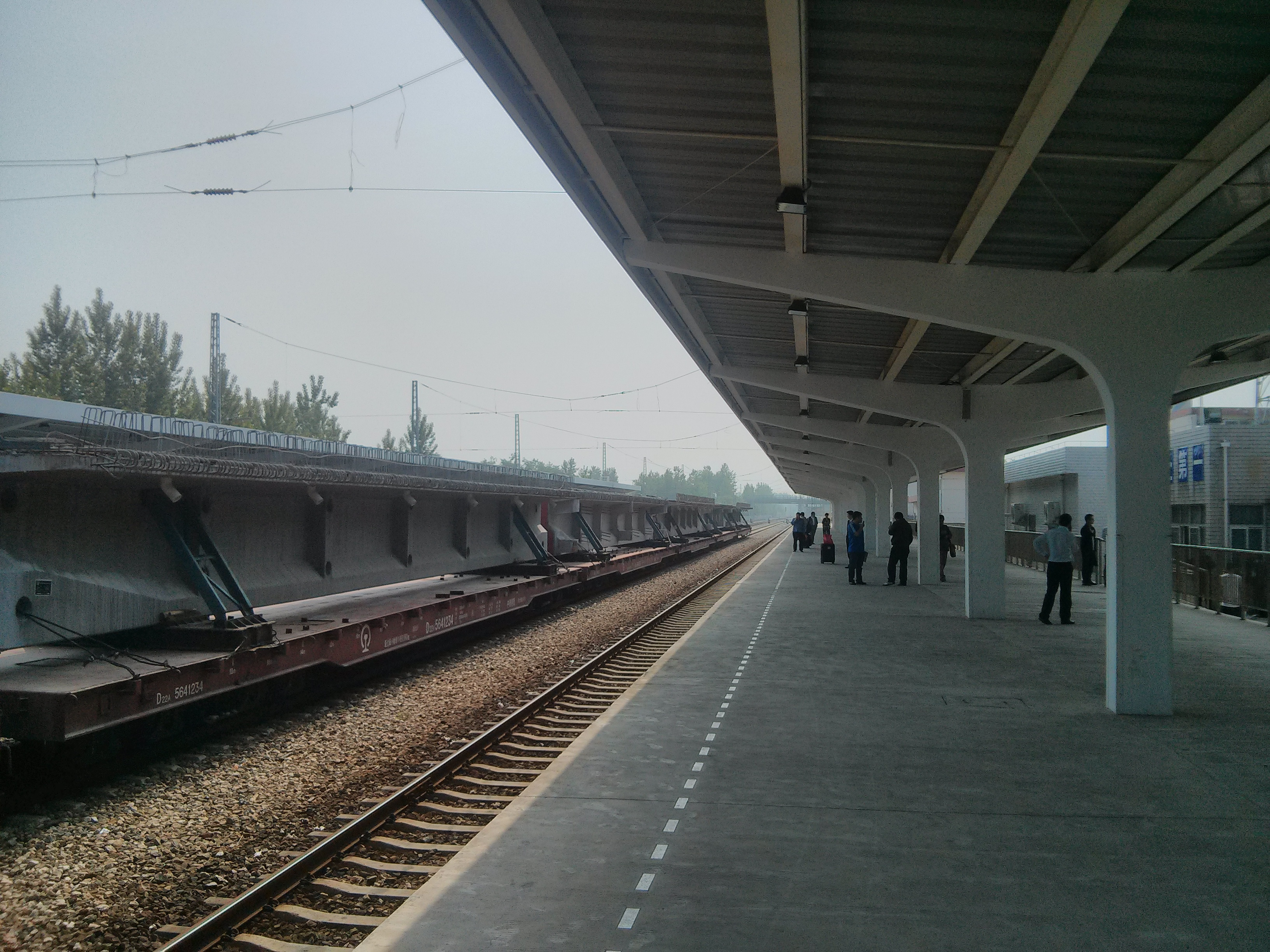 中文（中国大陆）: 固始站第一站台